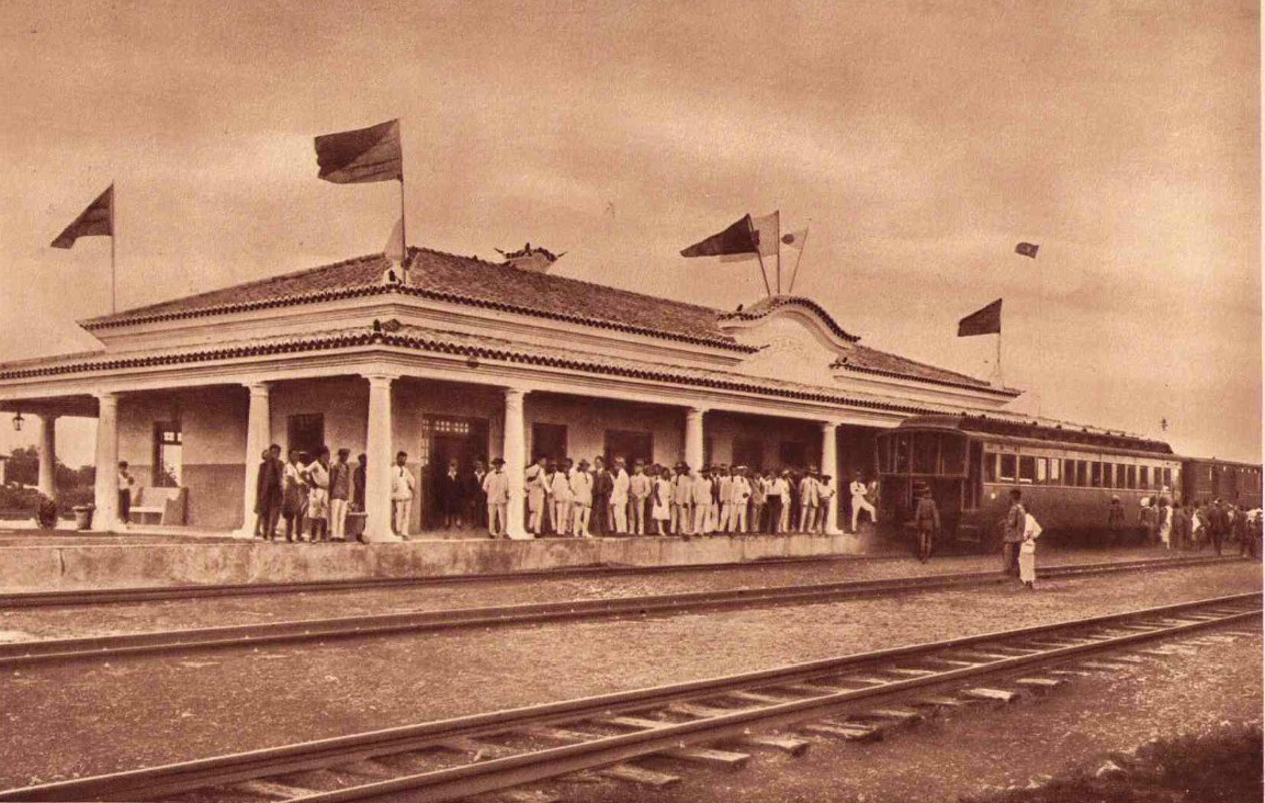 Bahnhof Moamba, Mosambique, um 1920